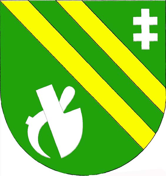 Znak obce Přísnotice